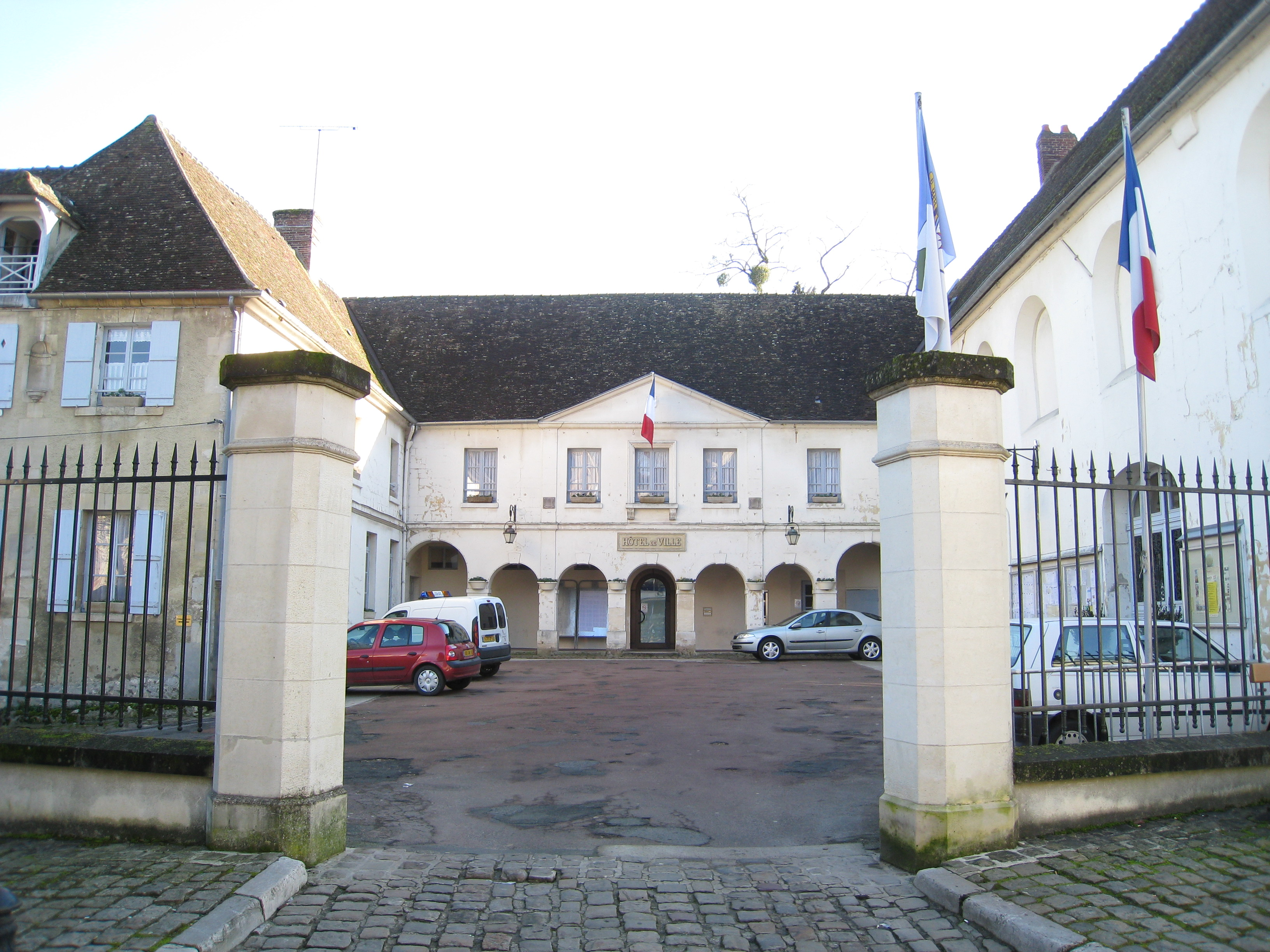 Mairie de Chaumont en Vexin, Oise, France